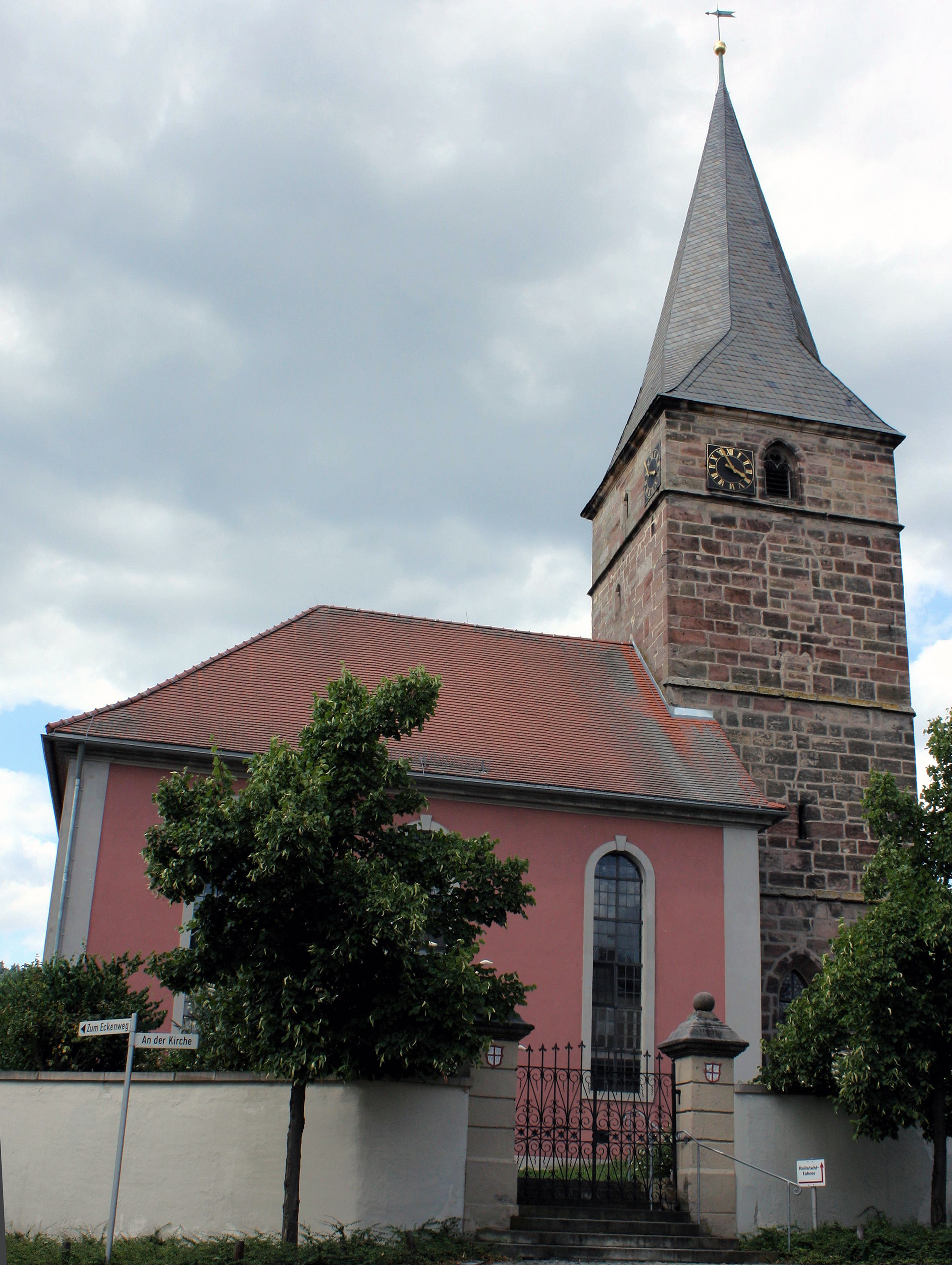 Kirche zu Harsdorf (Oberfranken, Landkreis Kulmbach)